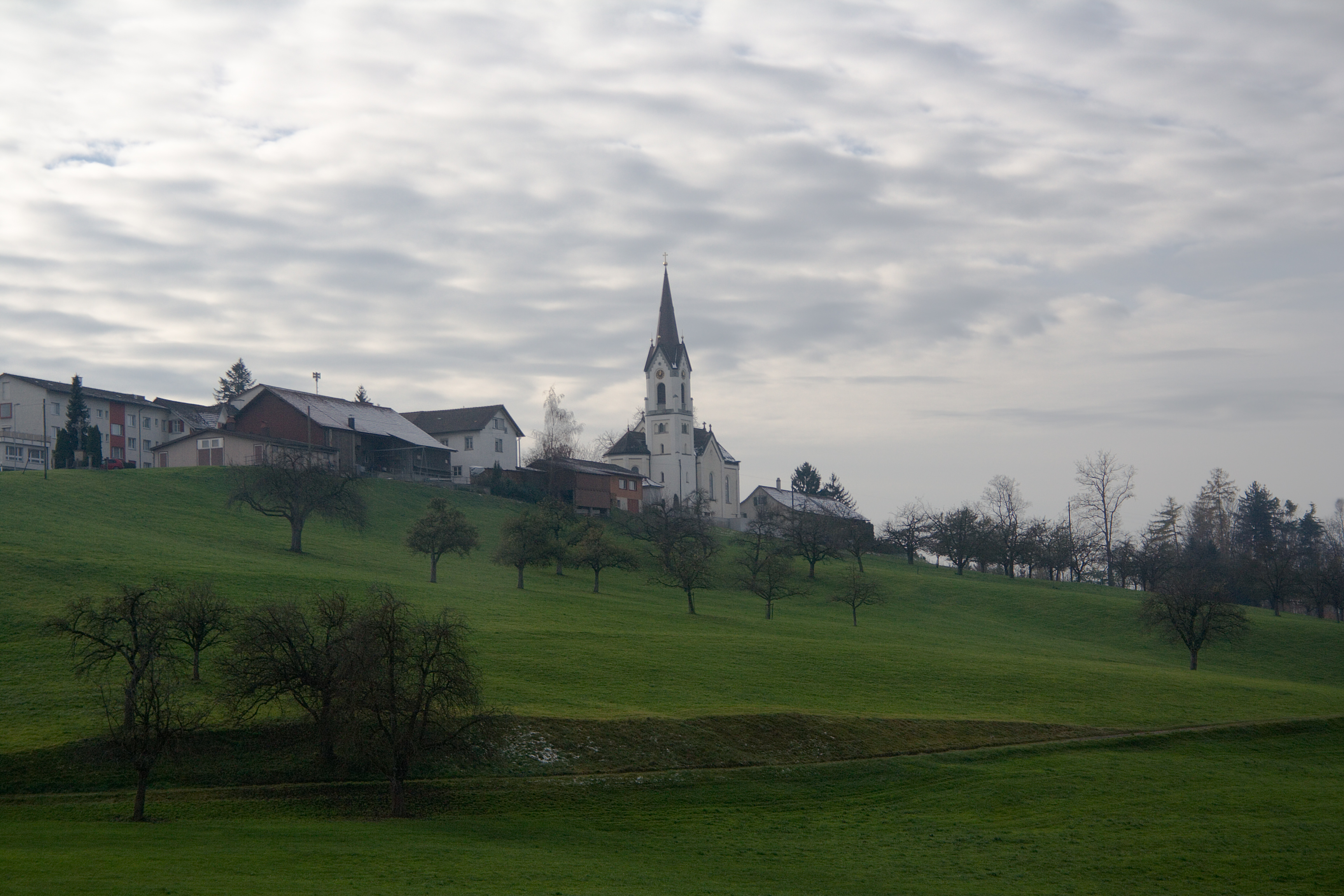 St. Pelagiberg mit Kirche und Altersheim, Gemeinde Hauptwil-Gottshaus, Schweiz